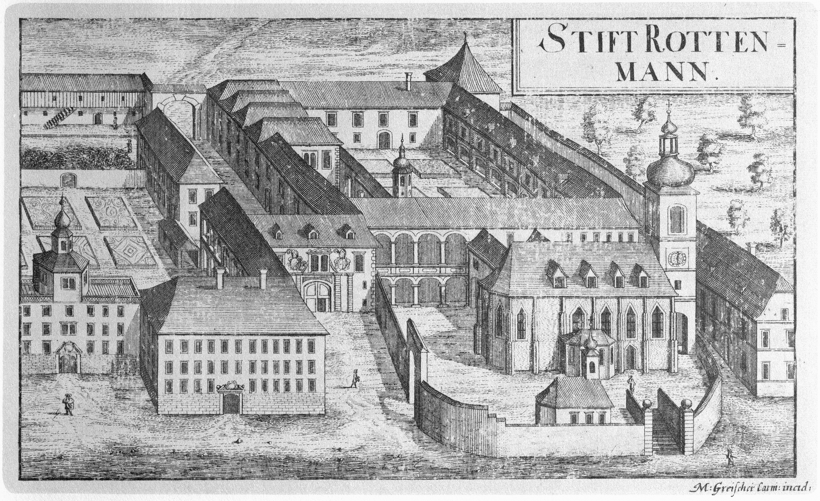 G. M. Vischers Käyserlichen Geographi, Topographia Ducatus Stiriae, Das ist: Eigentliche Delineation / und Abbildung aller Städte / Schlösser / Marcktfleck / Lustgärten / Probsteyen / Stiffter / Clöster und Kirchen / so es sich im Herzogthumb Steyrmarck befinden; Und anjetzo Umb einen billichen Preyß zu finden seynd Bey Johann Bitsch Universitäts Buchhandlern / Auff dem Juden=Platz bey der guldenen Saulen. Graz 1681 Die Nummerierung der Dateien folgt der alphabetischen Reihung der Ortsnamen und entspricht nicht dem Vischer-Register